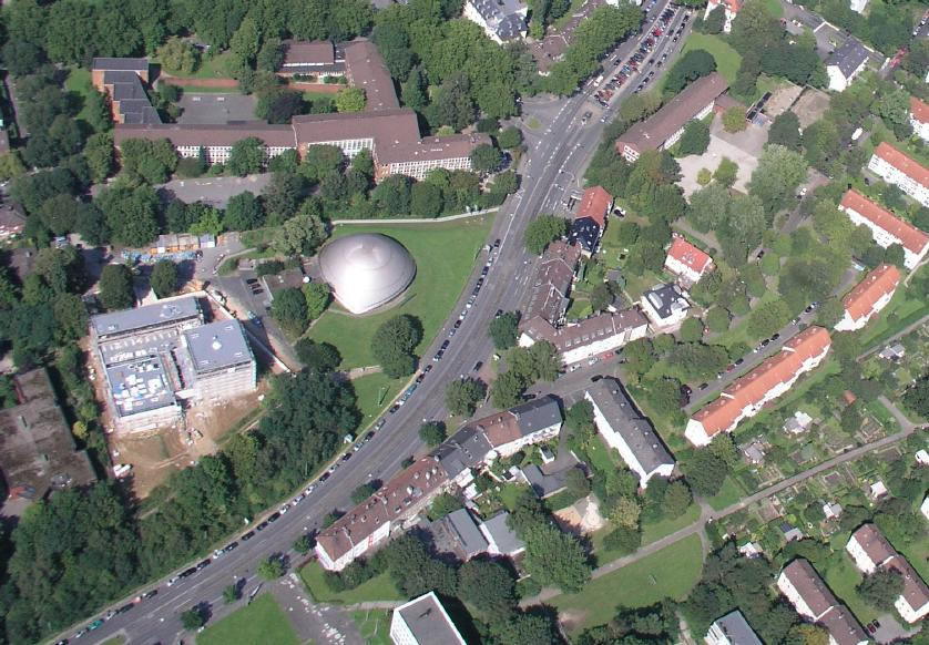 Der Bau der Bochumer Synagoge. Links im Bild die Synagoge, in der Bildmitte das Bochumer Planetarium und diagonal durch das Bild die Castroper Straße. Blick (etwa) in nördliche Richtung.